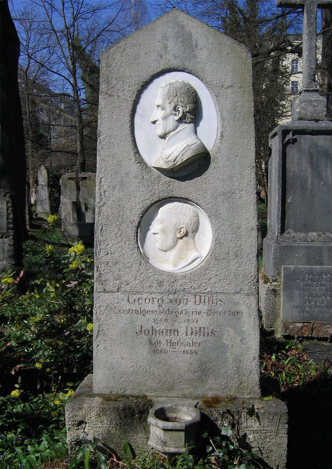 Grabmal Johann Georg von Dillis, Alter Südfriedhof München